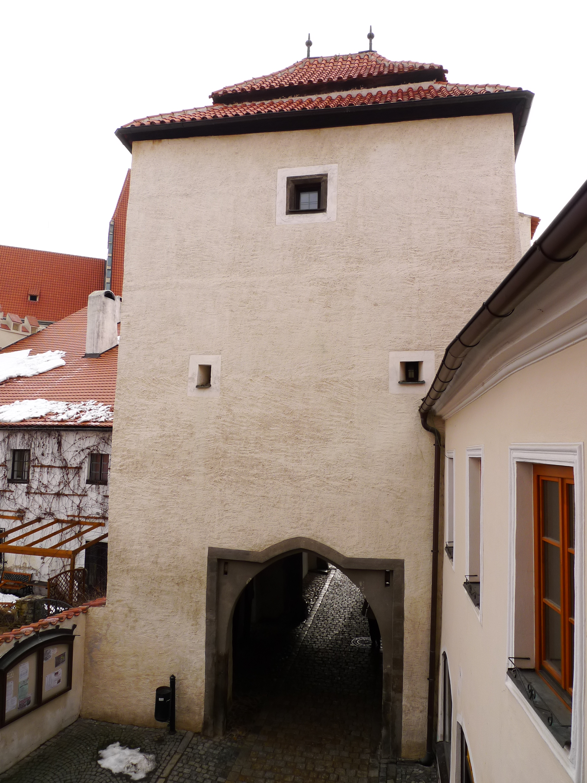 Městské opevnění - Písecká brána, bašty, parkánová a hradební zeď (Prachatice), kolem historického jádra města, Prachatice